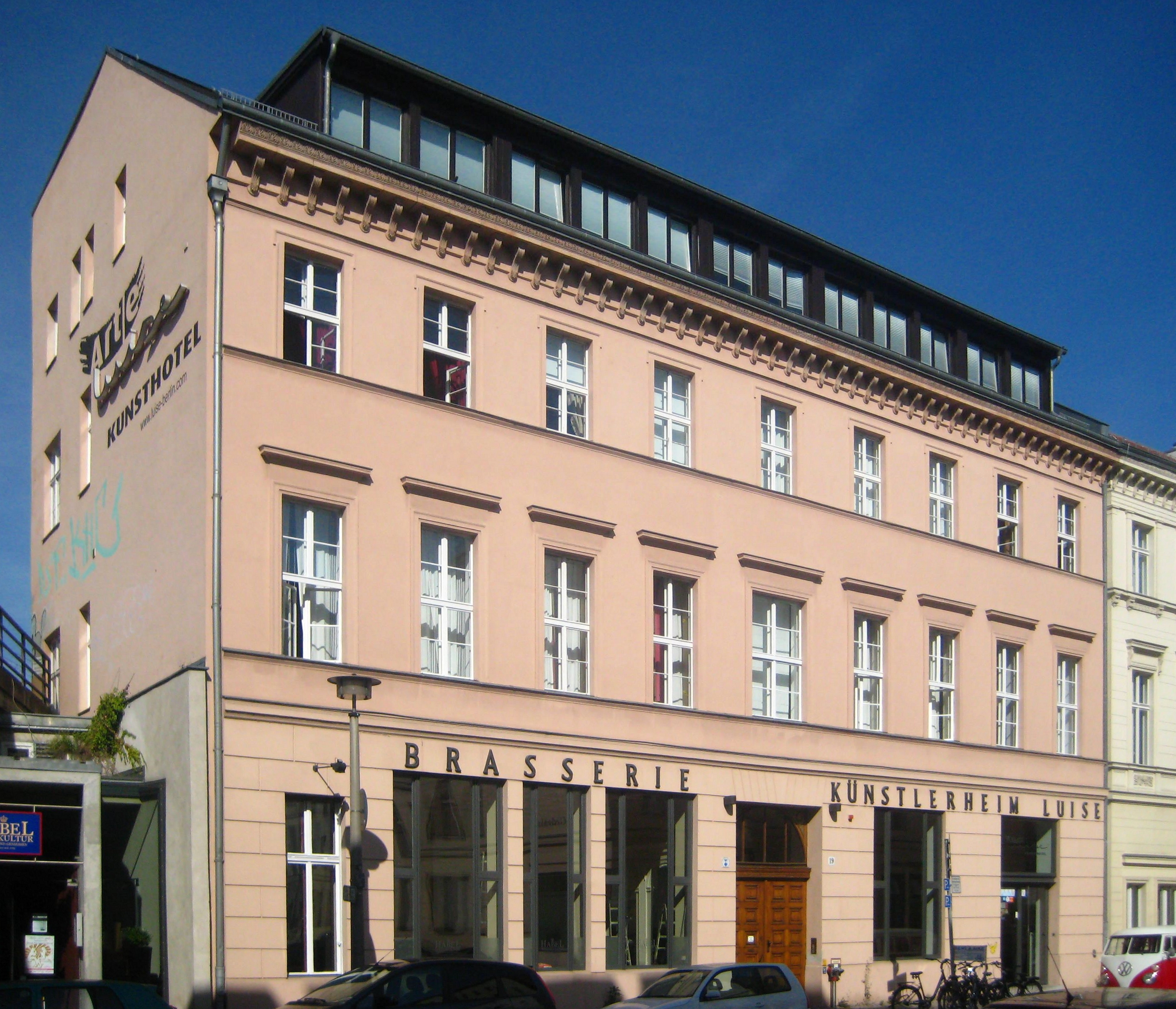 Die ehemalige Friedrich-Wilhelmstädtische Apotheke in der Luisenstraße 19 in Berlin-Mitte, heute "Arte Luise Kunsthotel". Das Gebäude wurde 1827-1828 als Wohnhaus für den Chirurgen und Augenarzt Christian Johann Jüngken erbaut. 1833 richtete der neue Besitzer Wallmüller im Erdgeschoss eine Apotheke ein. Die Fassade zeigt weitgehend die bauzeitliche Gliederung; bei der Wiederherstellung nach Kriegsschäden wurde 1958 allerdings auf die Rekonstruktion eines Balkons über der Durchfahrt verzichtet. Im Inneren ist eine von vier Säulen getragene, dreiläufige Holztreppe erhalten geblieben. Beim Umbau zum Hotel wurde 2002 ein südlicher Erweiterungsbau angefügt, der auch als Schallschutz zur anliegenden Stadtbahntrasse dienen soll. Die 50 Zimmer des Hotels sind von verschiedenen Künstlern individuell gestaltet worden. Das Gebäude ist als Baudenkmal gelistet.